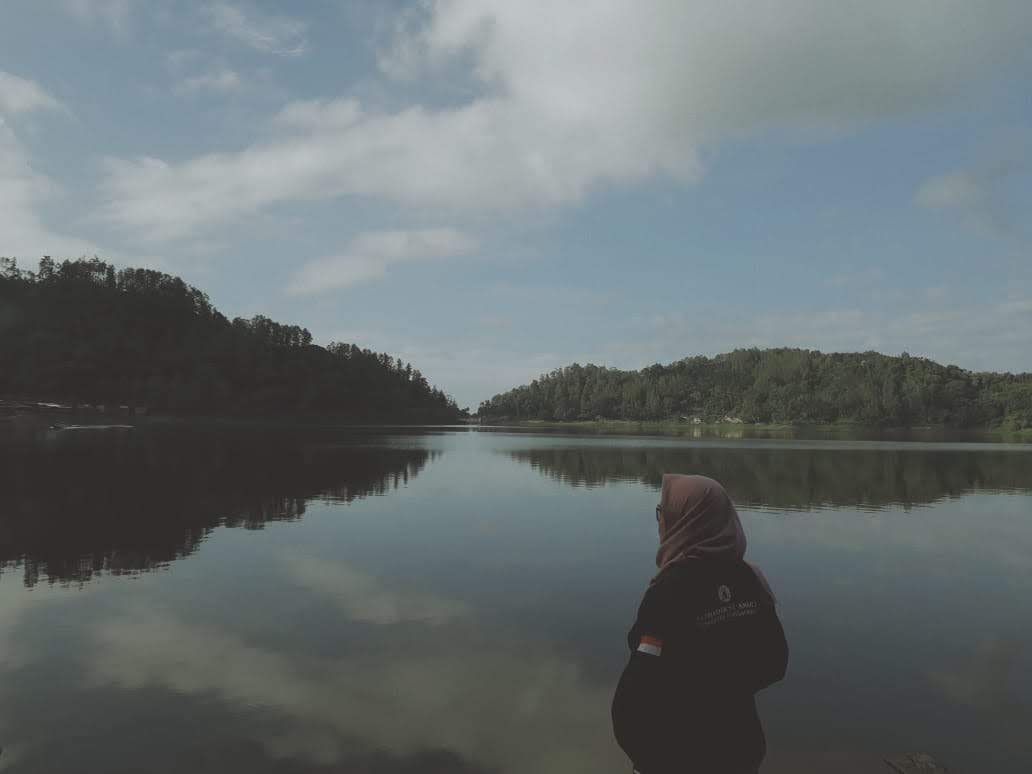 Jawa: Telaga Ngebel menika salahsatunggaling kaéndahan alam ing Kitha Ponorogo.